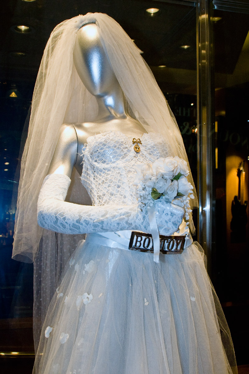 Vestido de novia que llevó Madonna interpretando Like a Virgin en los premios MTV